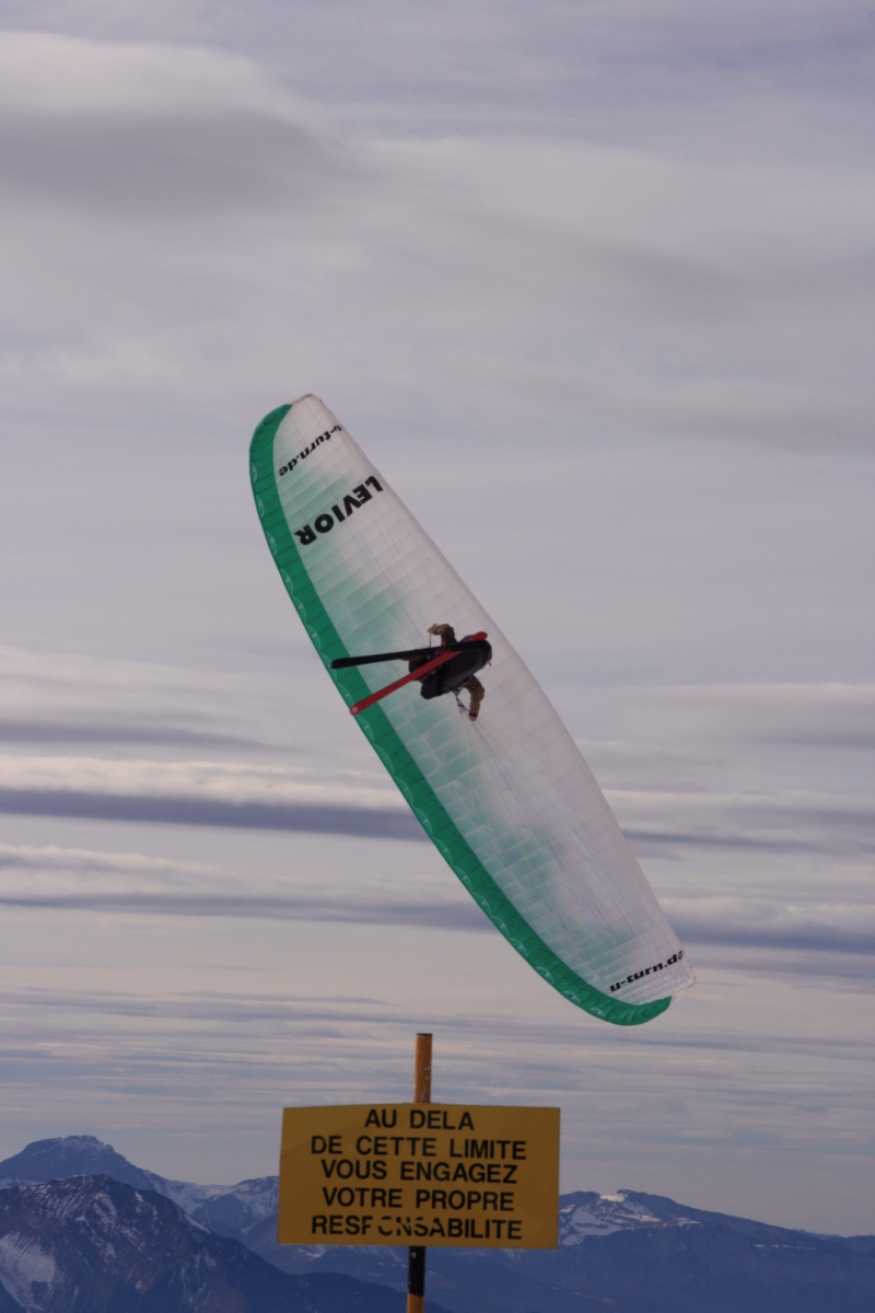 Paragliding at Les Contamines-Montjoie